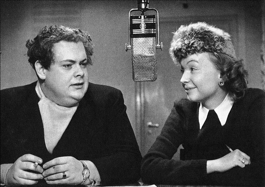 Åke Falck och Birgit Linton pratade film i radioprogrammet Fönstret.